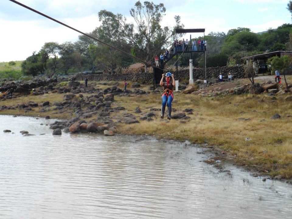 Ecuandureo parque